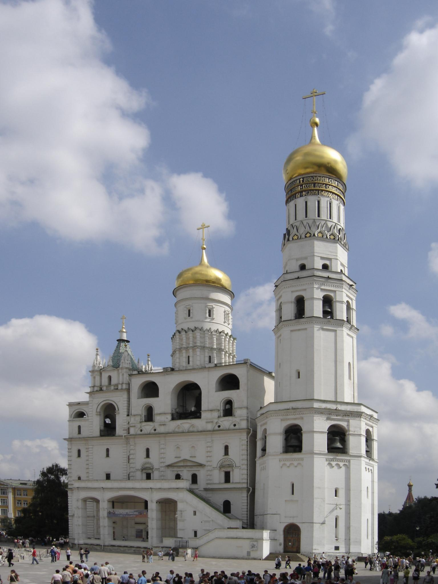 Kremlin de Moscou : clocher d'Ivan le Grand